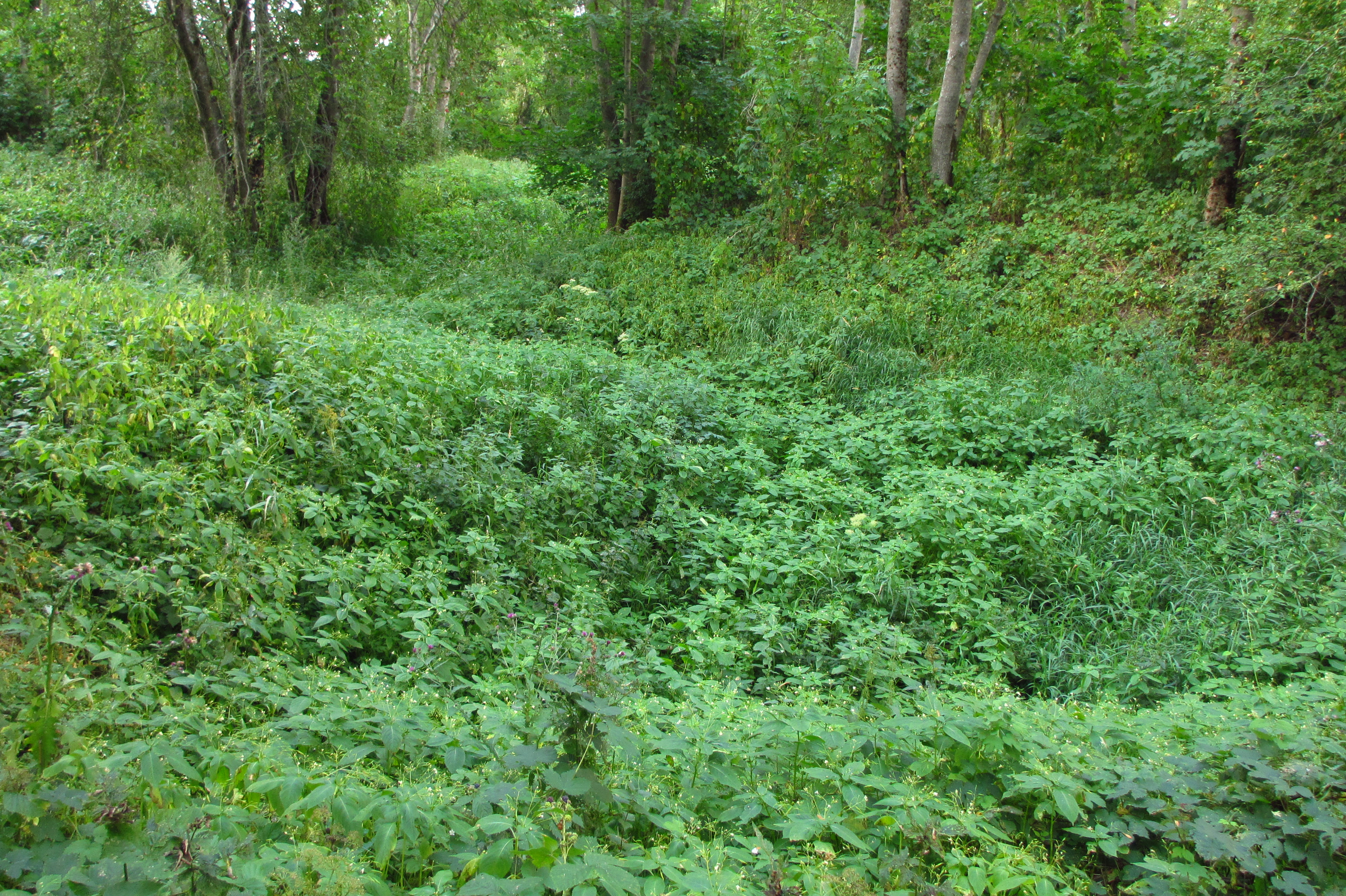 Salajõe org suvel Salajõe MKA-l